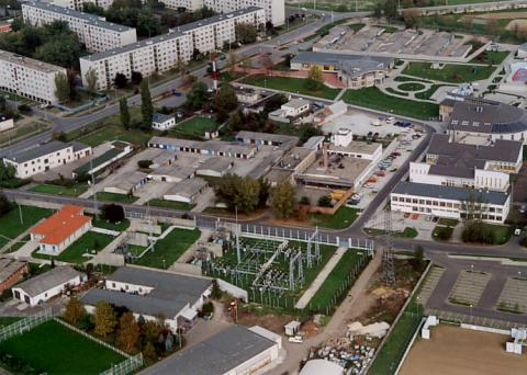 Tiszaújváros, Hungary, aerialphotgraphy